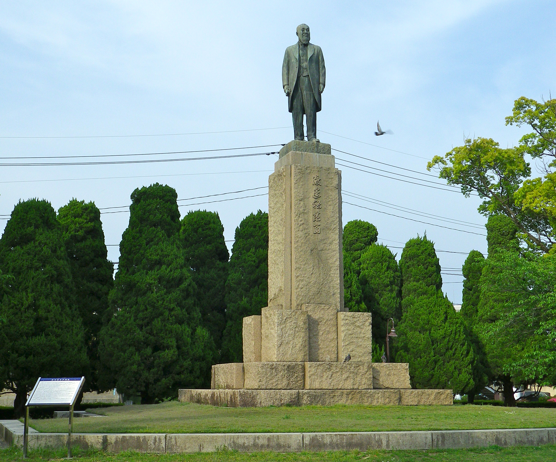 山口県宇部市。渡辺翁記念公園内の渡辺祐策像。